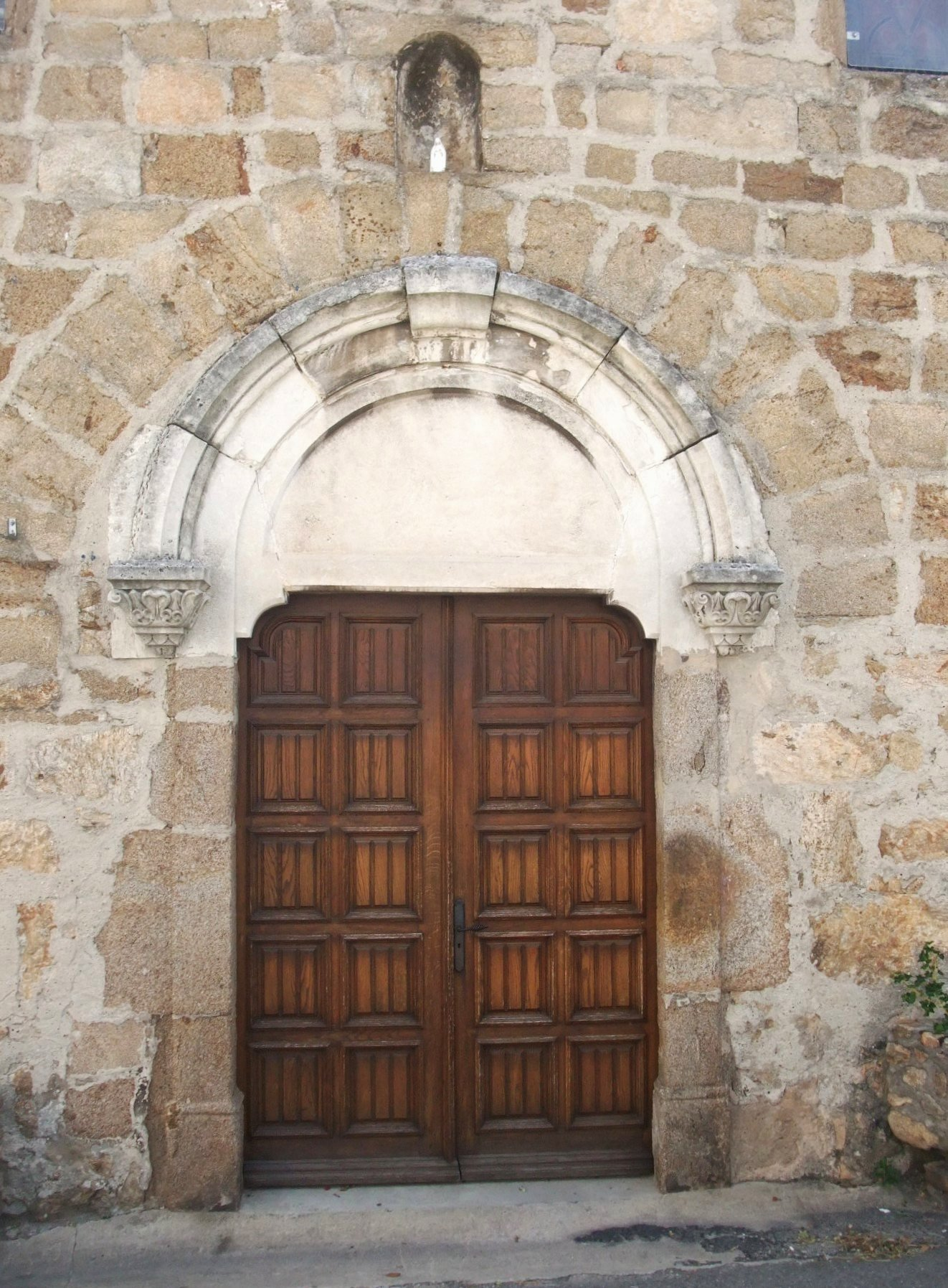 Roiffieux église arc roman